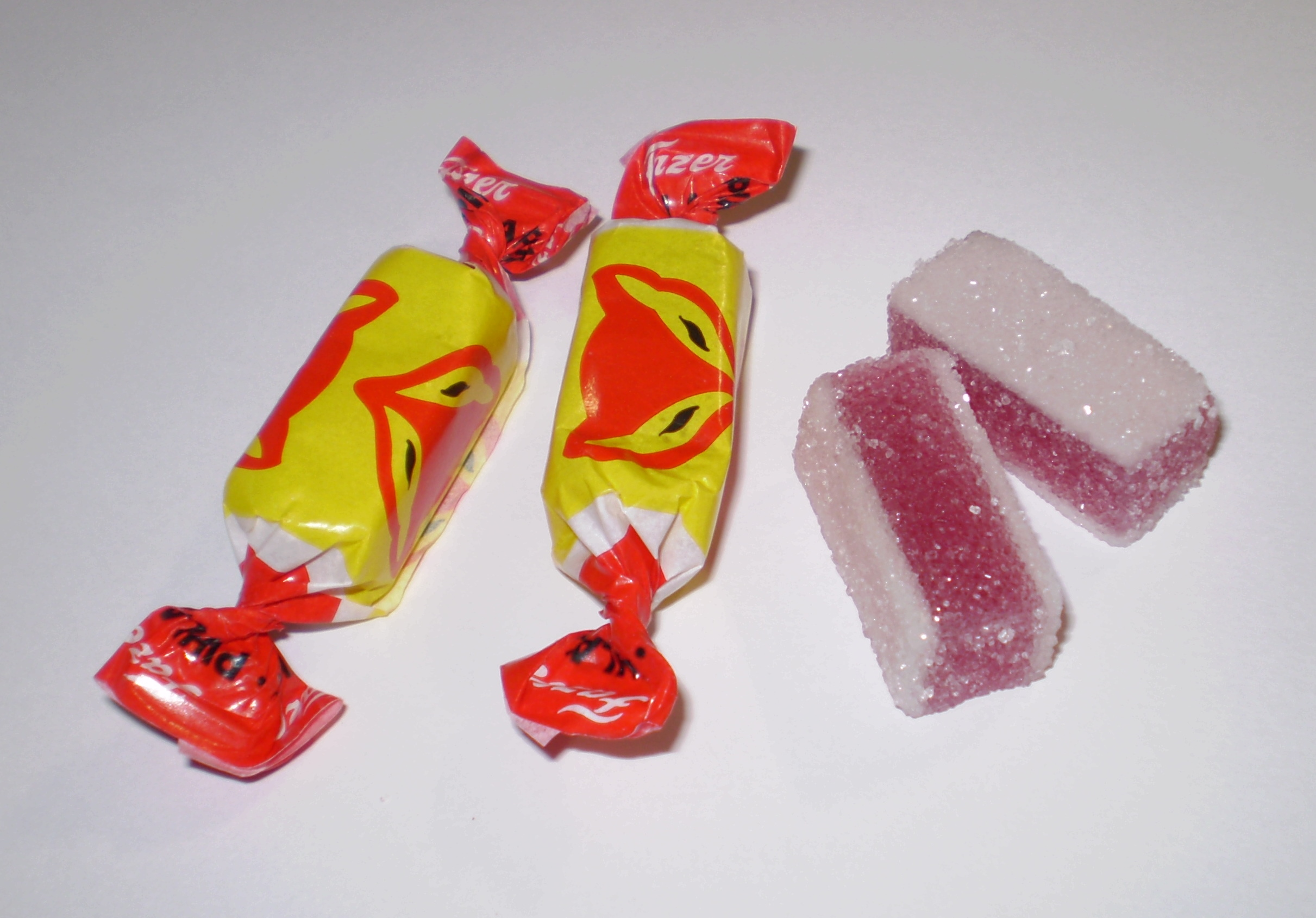 Fazerin Pihlaja-makeisia